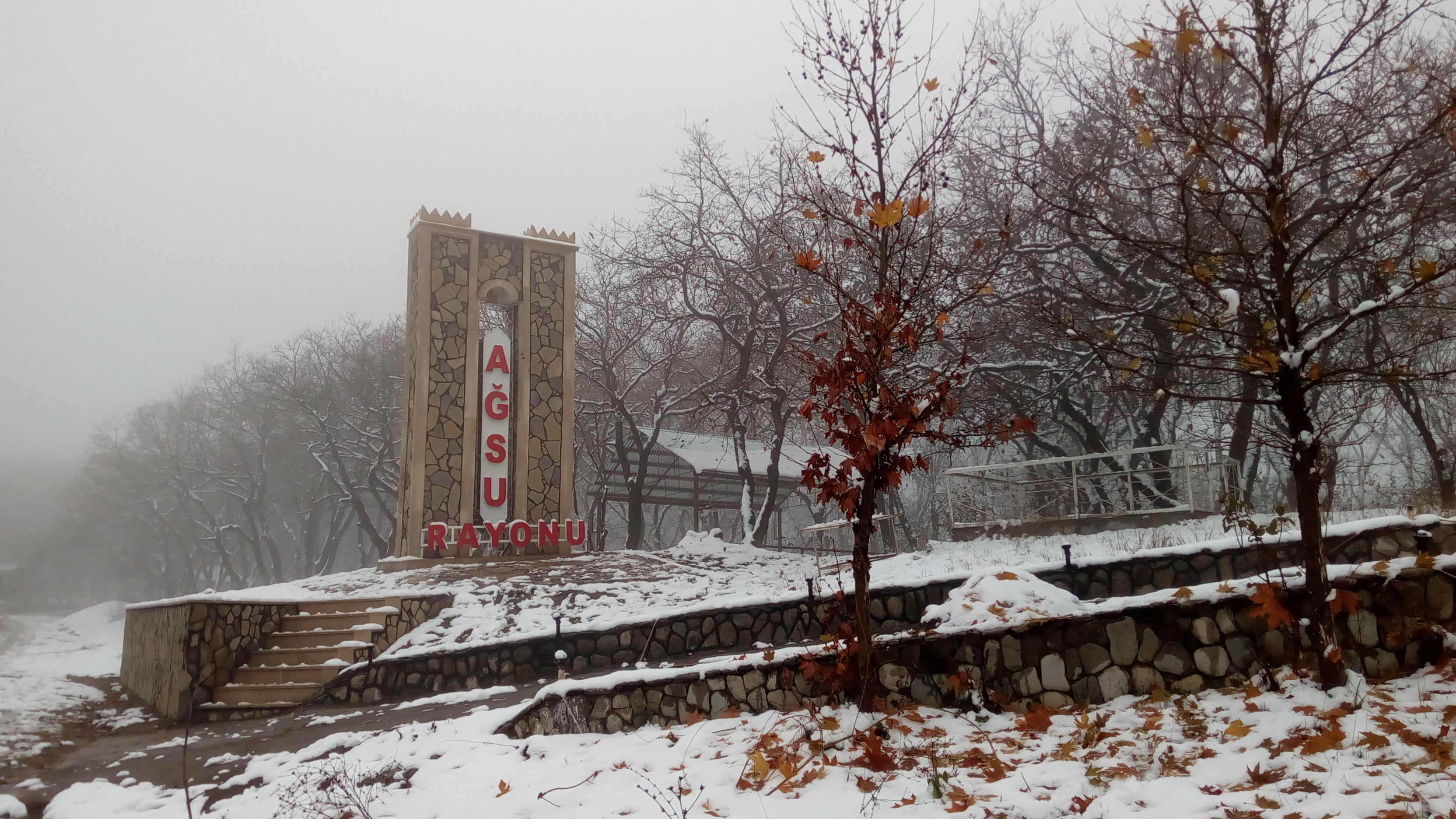 Ağsu perevalı